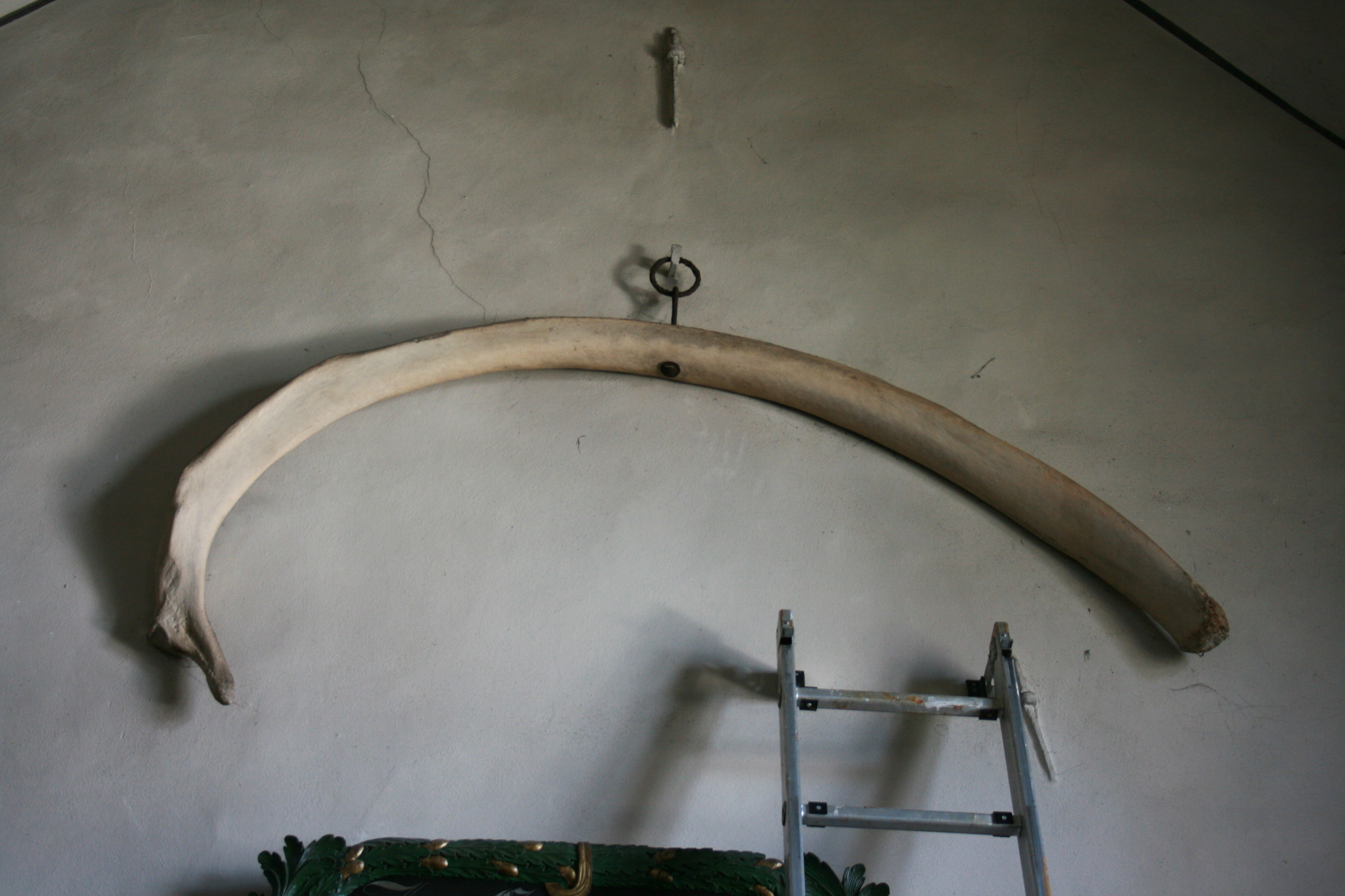 Evangelische Jakobus-Kirche an der Denkmalstraße in Breckerfeld